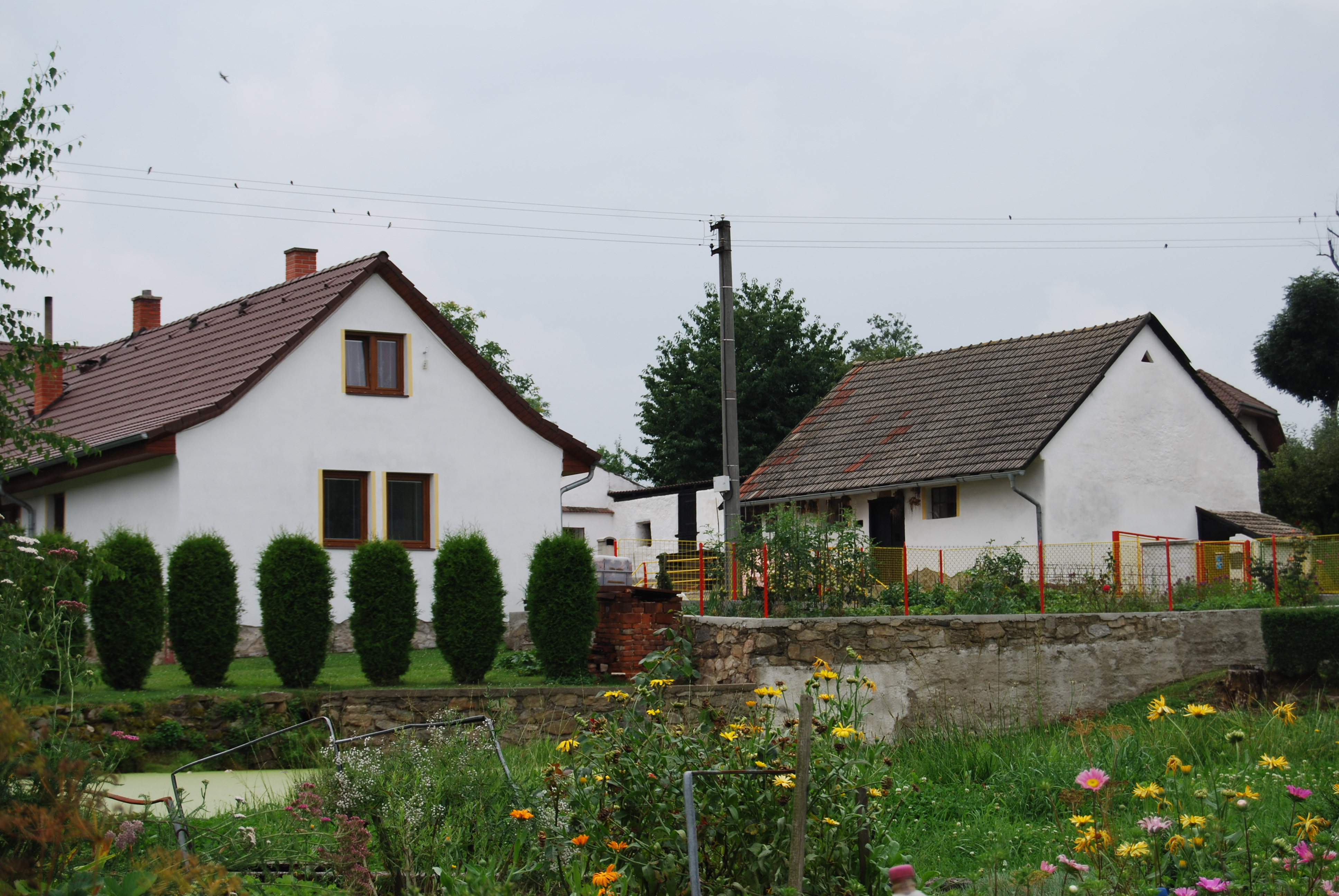 POhled na část vesnice. Dobrošovice je část obce Jesenice v okrese Příbram. Česká republika. - Google Maps - Google Earth